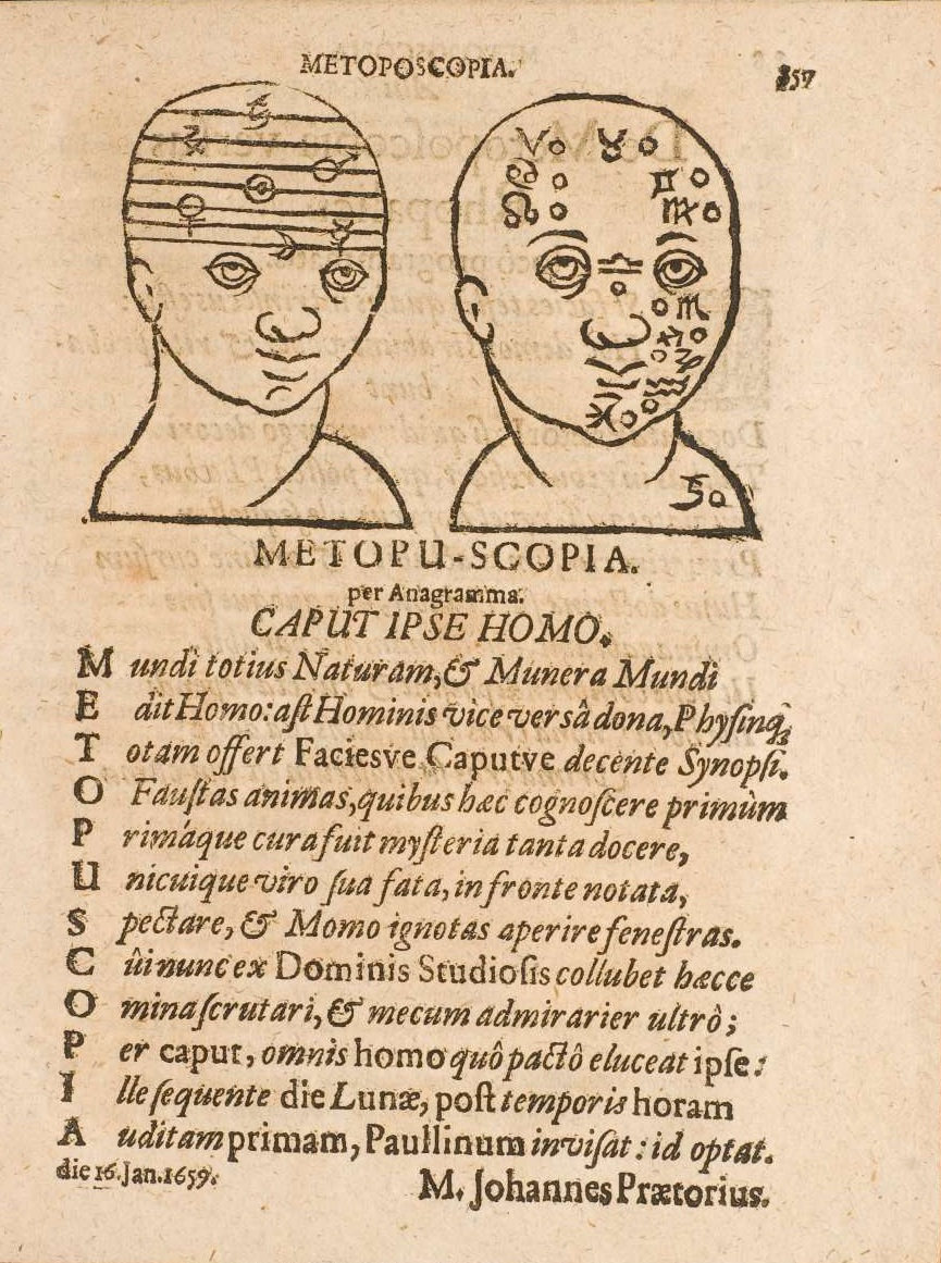 Anagrama sobre Metopu-Scopia, o Metoscopía.